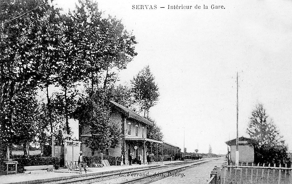 L'intérieur de la gare construite par la Compagnie de la Dombes.